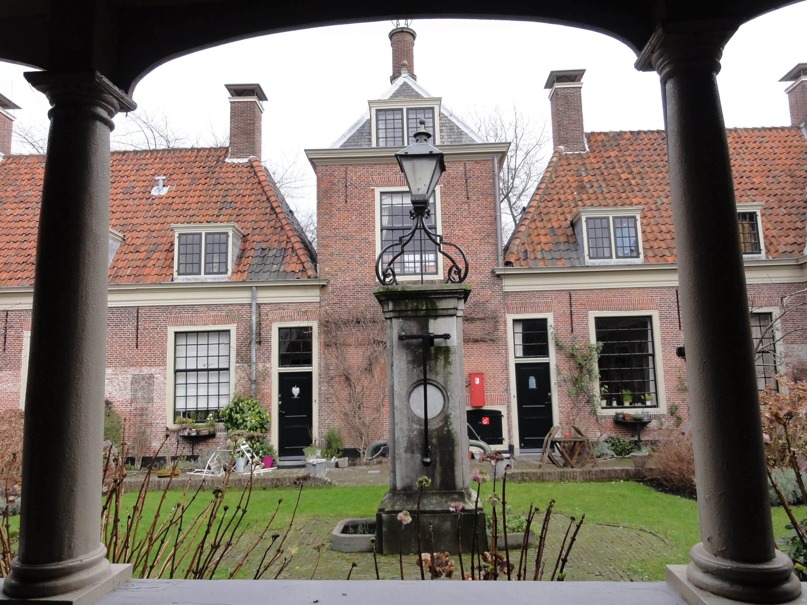 Pieter Loridanshofje aan de Oude Varkenmarkt 1 te Leiden